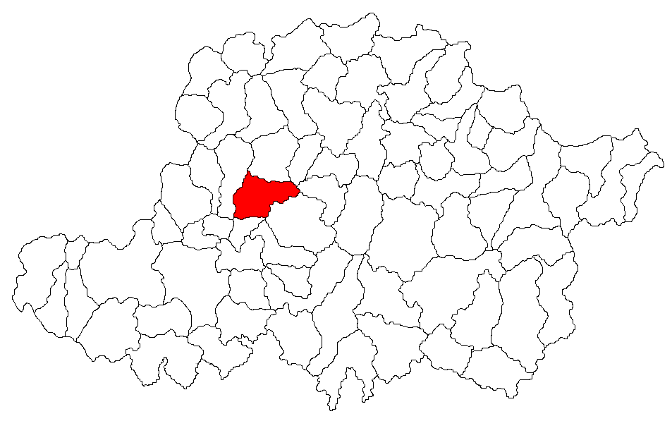 Categorie:Hărţi ale judeţului Arad